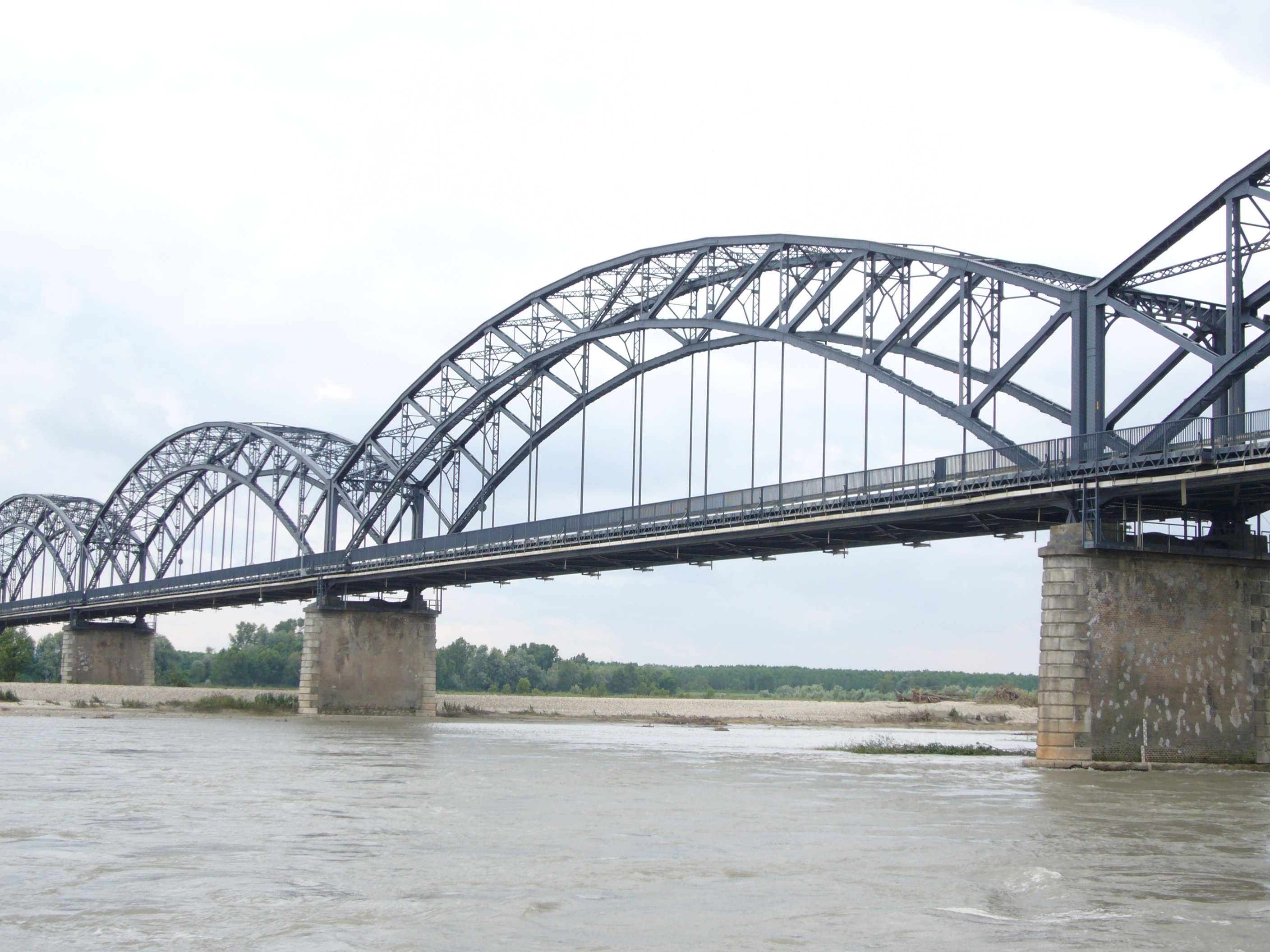 Ponte sul fiume Po, Balossa Bigli, Mezzana Bigli, Pavia, Lombardia, Italia